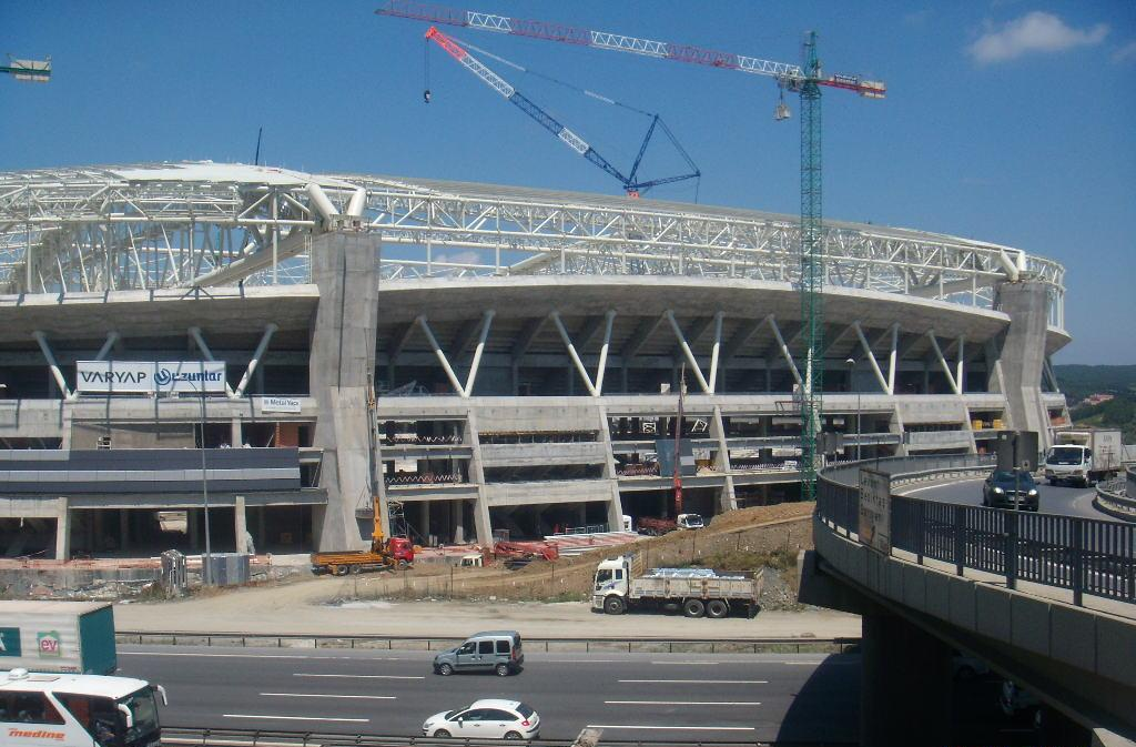 Türk Telekom Arena